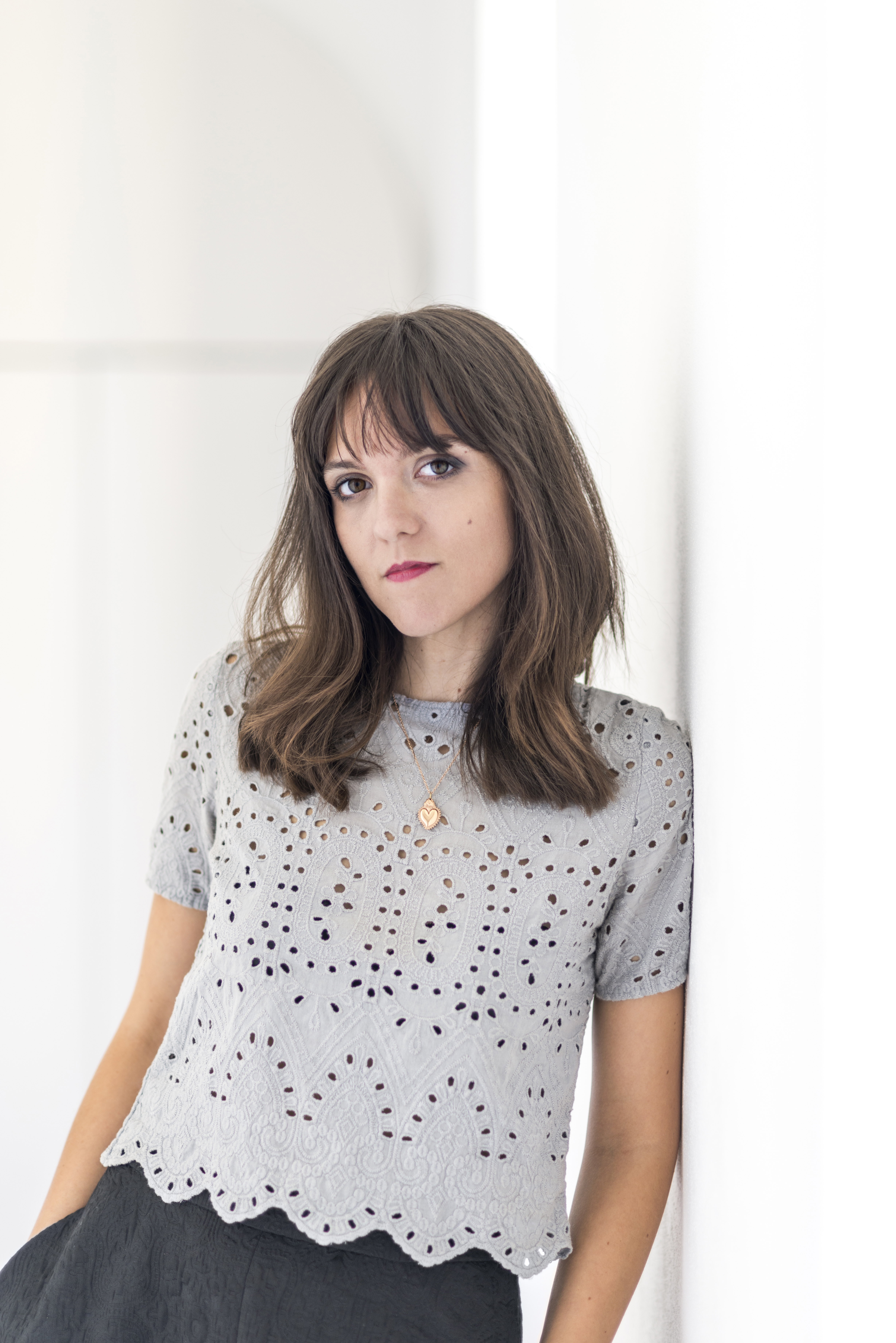 Giuliana Altamura a Milano, autunno 2016.